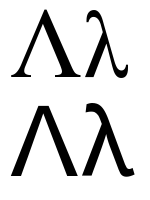 greek letter lambda